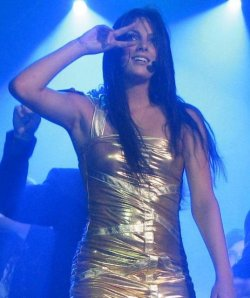 Carolanne D'Astous-Paquet lors d'un spectacle de la tournée de Star Académie 2009.